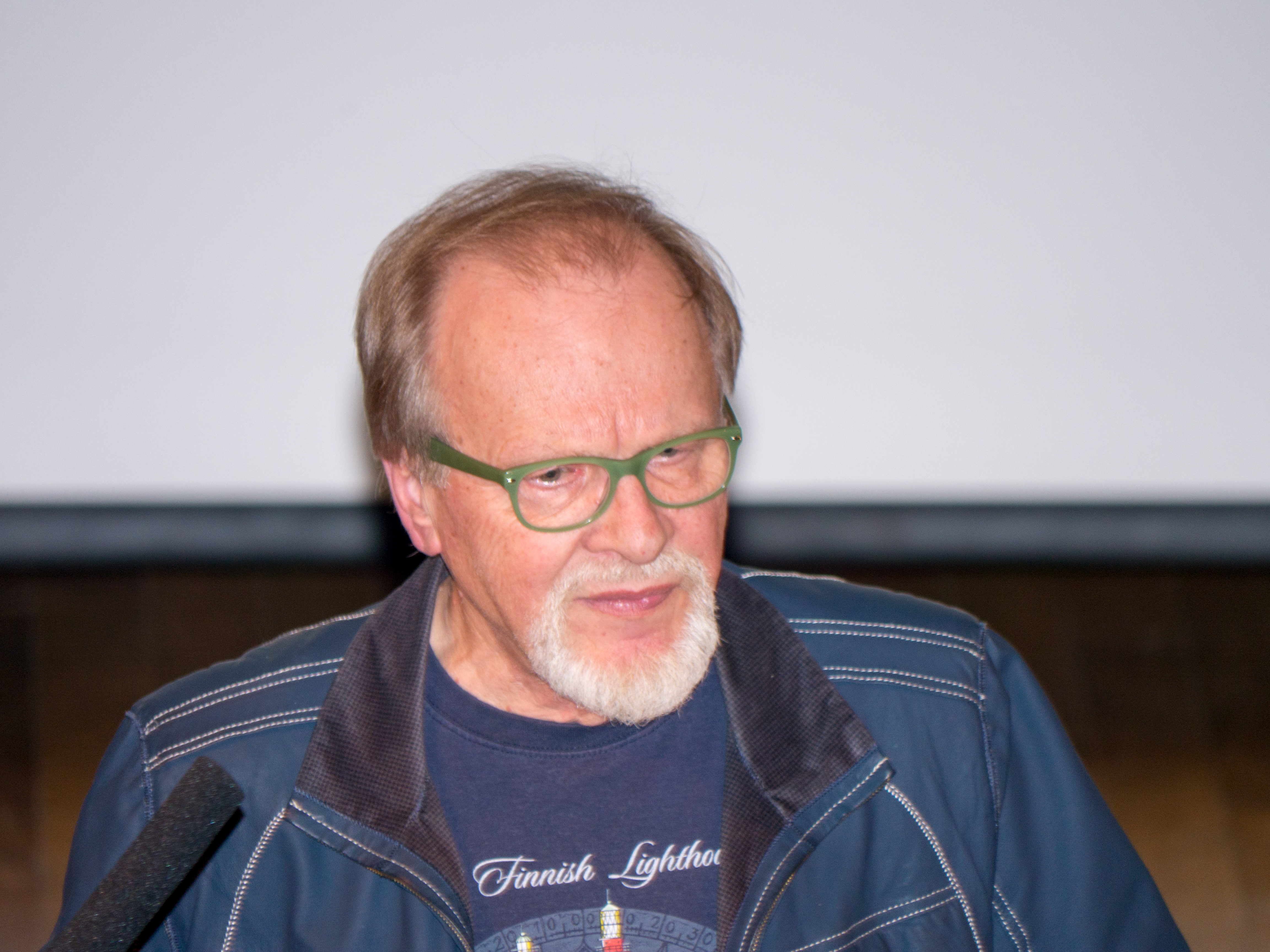 Markku T Hyyppä suomalainen kirjailija